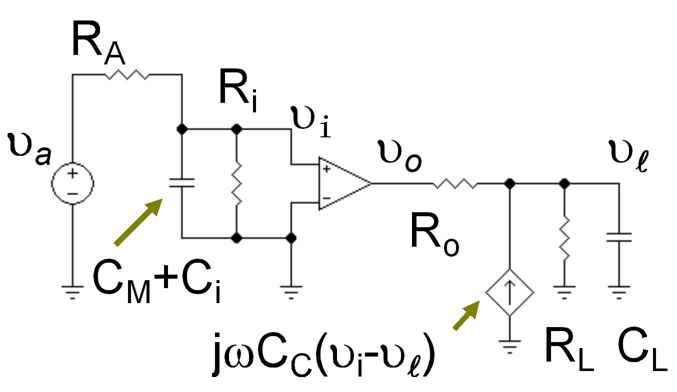 OpAmp pole splitting example after Miller transformation